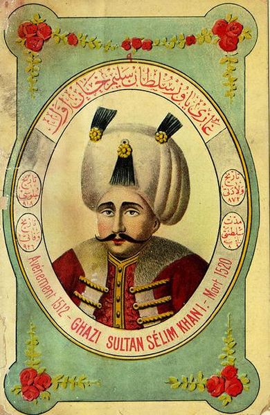 I. Selim'in tarihi bir Fransız Kartpostal'ında görünümü